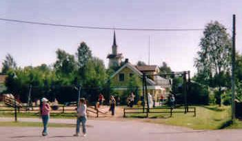 Pajala kyrkas torn reser sig i horisonten, sedd från prästgården, juli 2004. En bild tagen av Harri Blomberg.